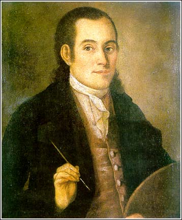 Self-portrait